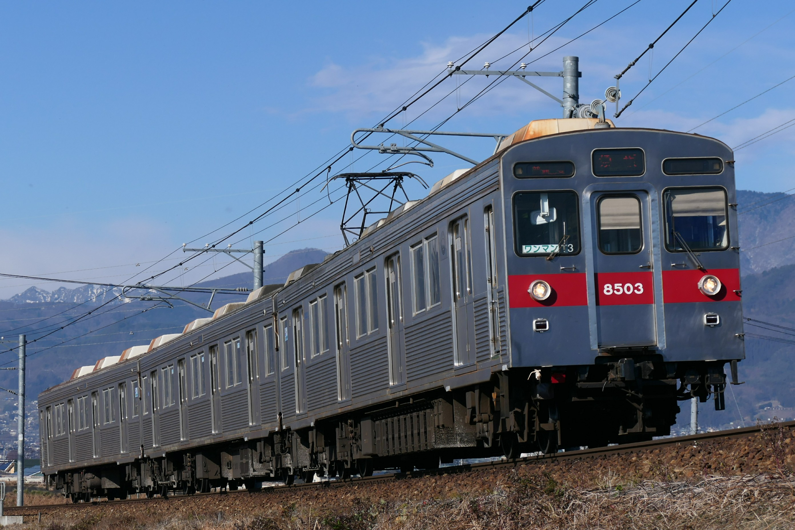 長野電鉄8500系電車T3編成